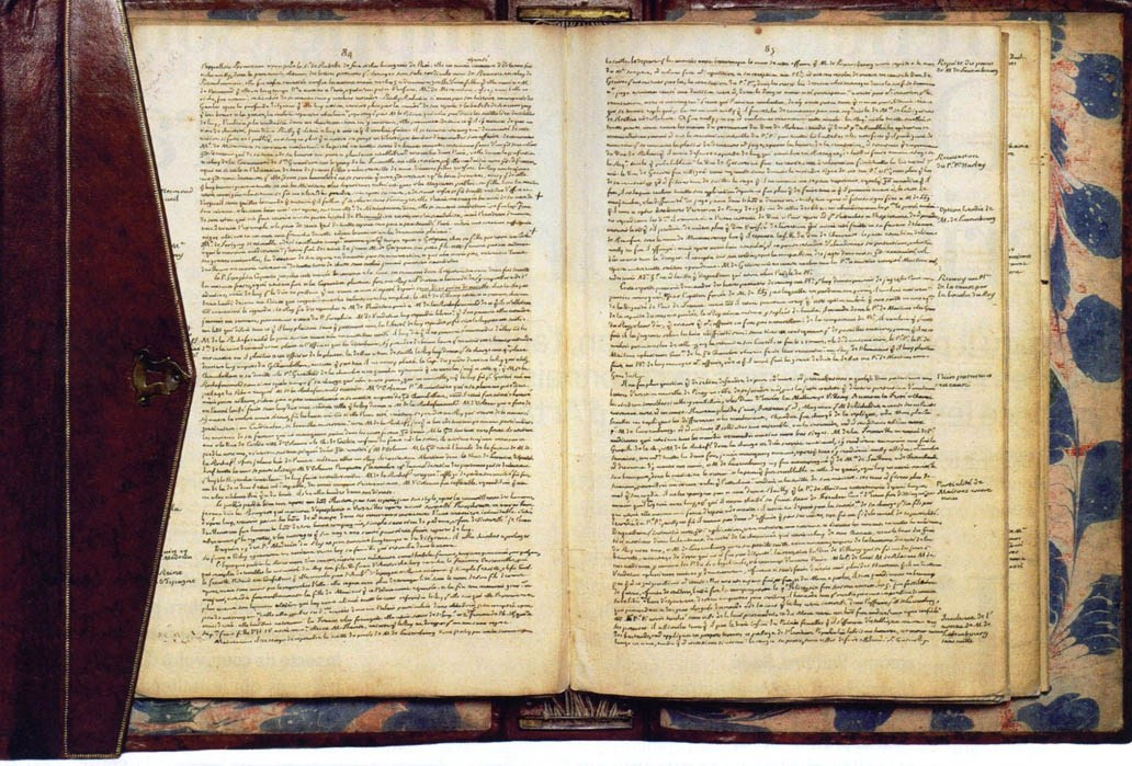 Manuscrit autographe des Mémoires de Louis, duc de Saint Simon